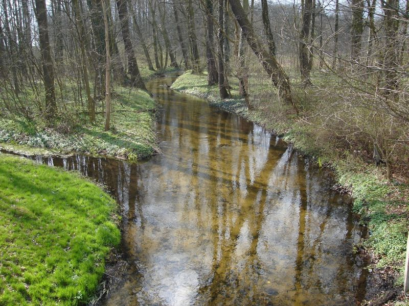 Gniła Obra w parku w Szczancu